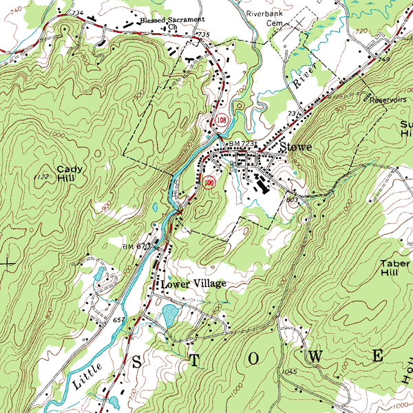 Beispiel einer Topographischen Karte